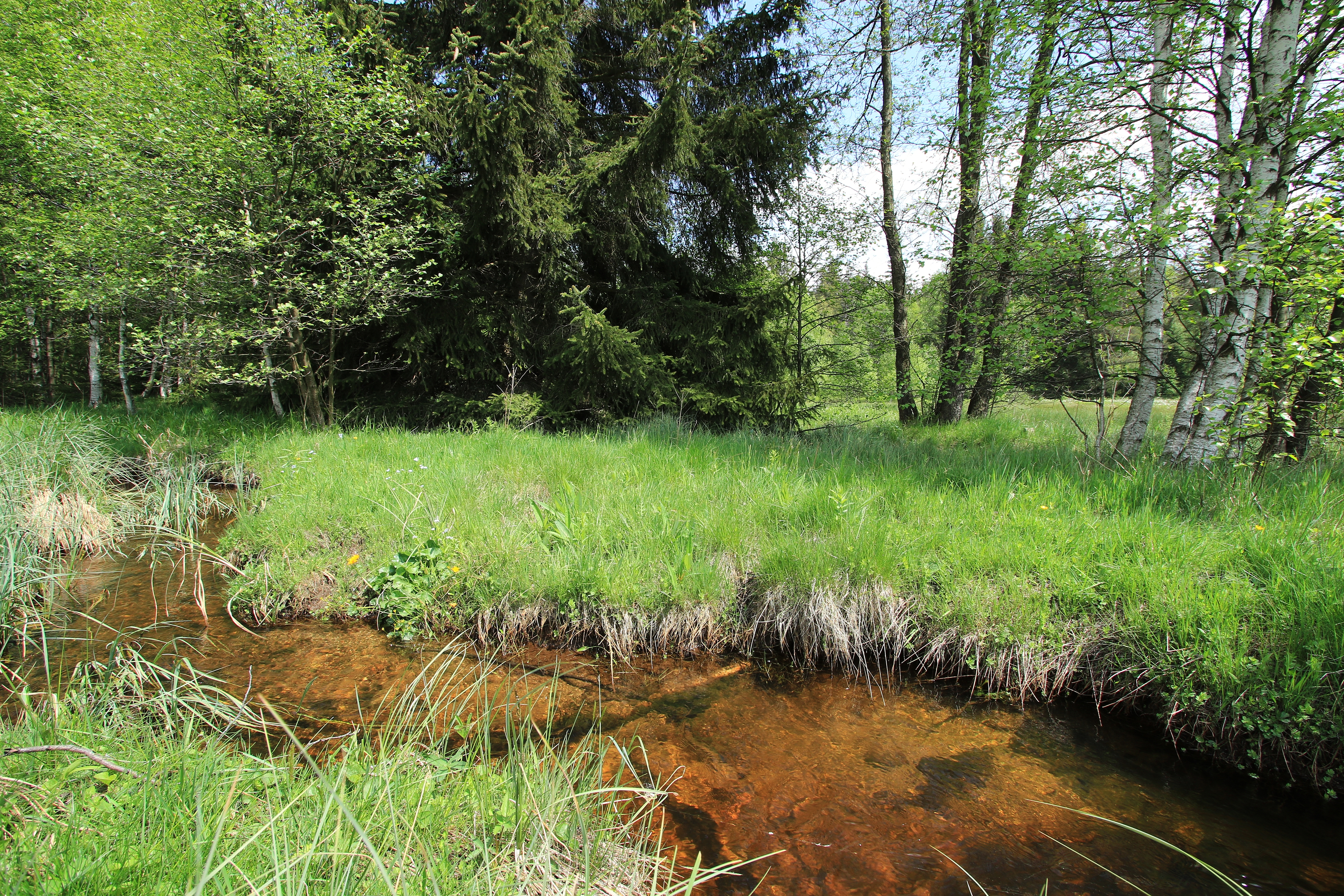 Naturschutzgebiet "Hermannsdorfer Wiesen" in Sachsen; Aufgenommen auf der rechten Seite Staatsstraße 222 zwischen Geyer und Elterlein.